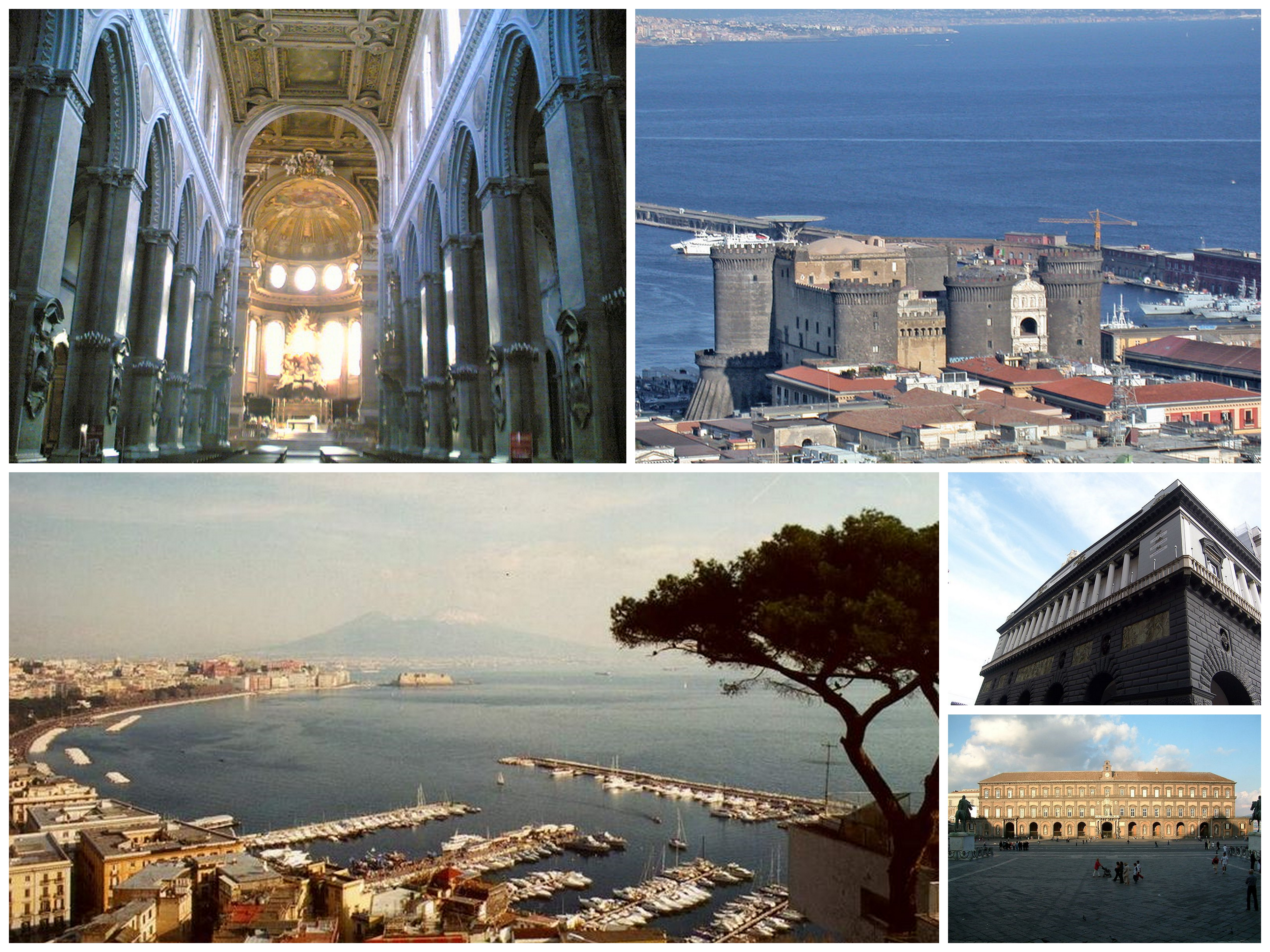 Collage di varie foto di Napoli